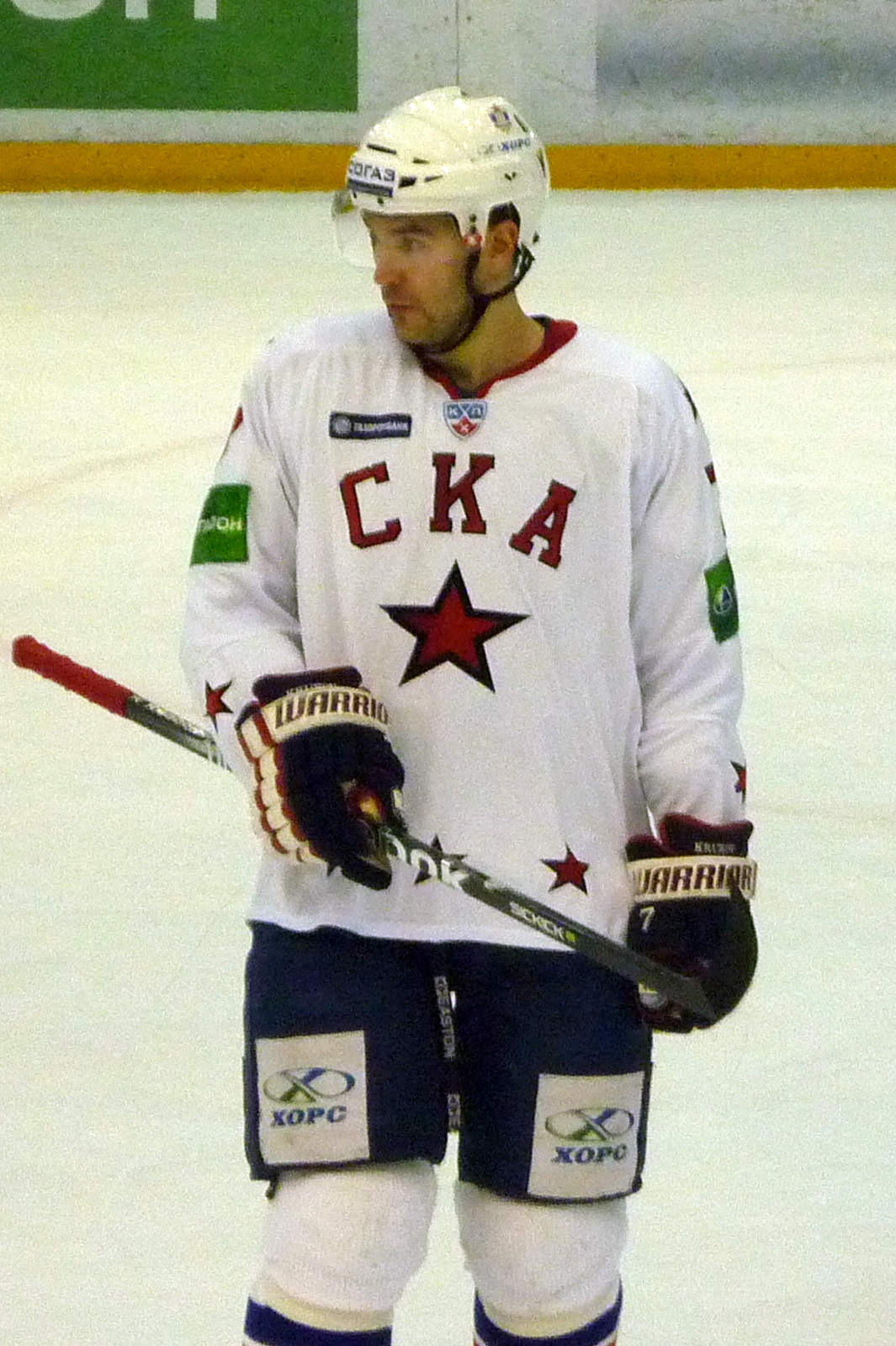 Нападающий питерского СКА Артём Крюков во время матча против нижегородского «Торпедо» 12 декабря 2010